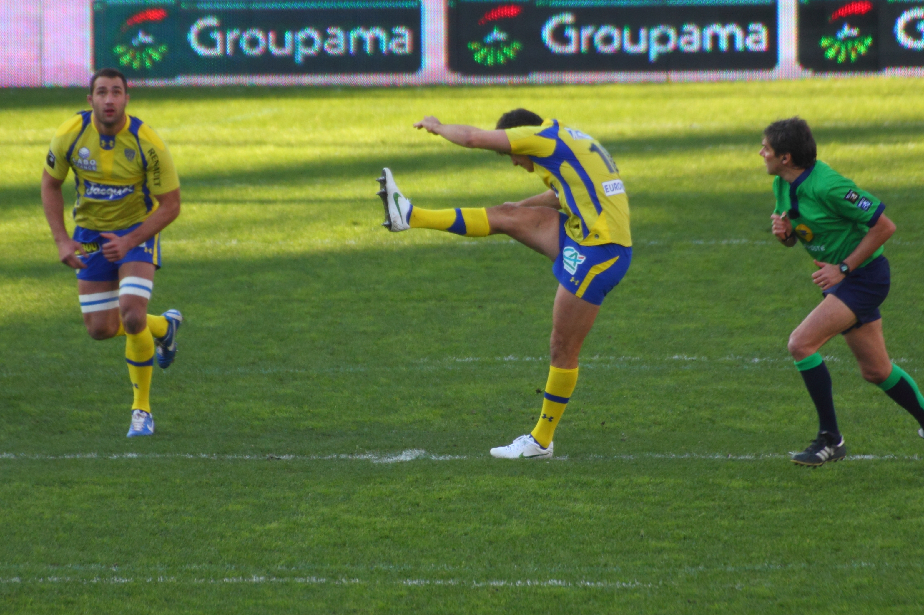 2012–13 Top 14 season — 1 décembre 2012, Stadium de Toulouse. Match between: Stade Toulousain — ASM Clermont-Auvergne